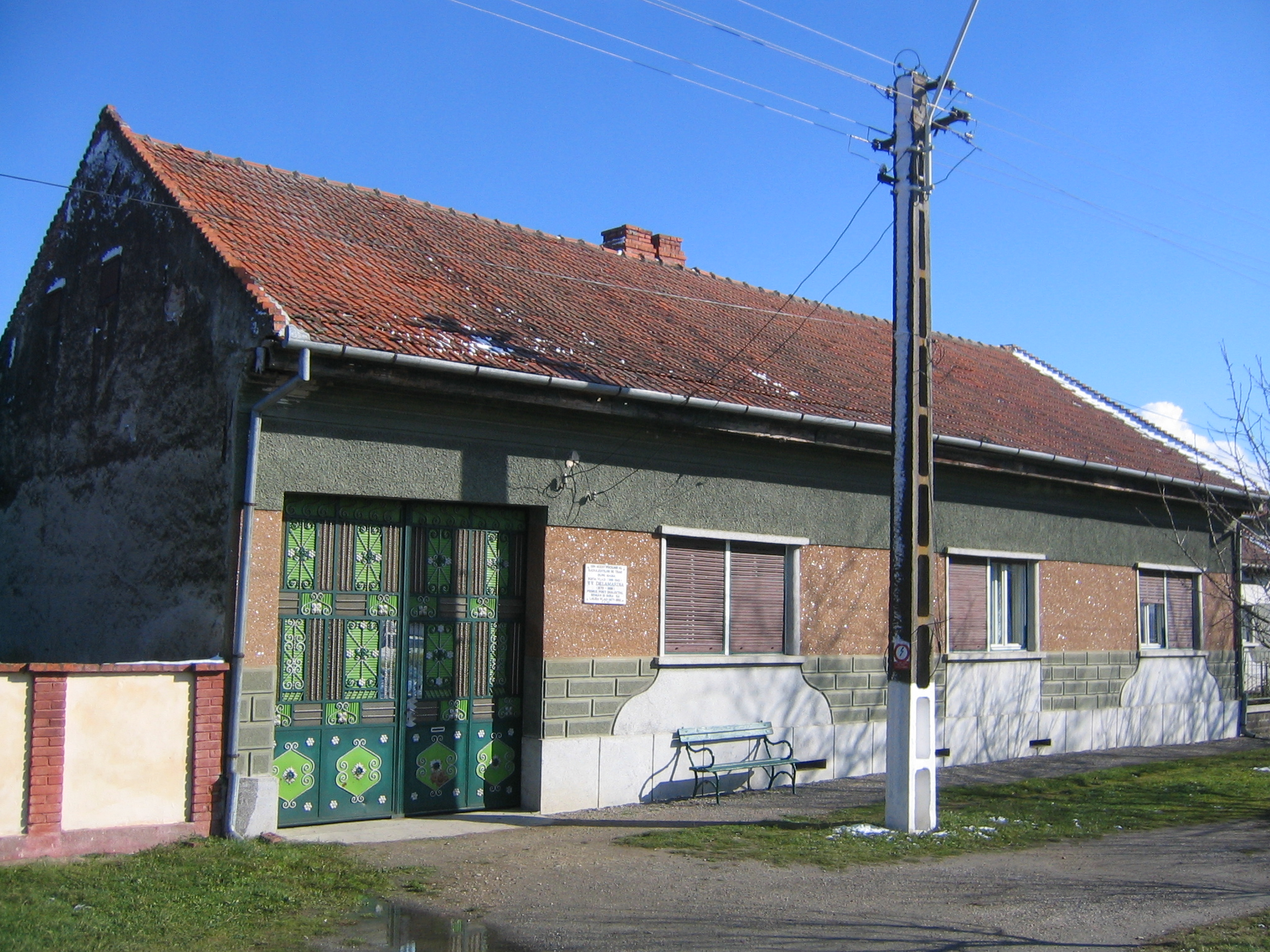 Casa Laurei Vlad din Chizătău (sora poetului Victor Vlad Delamarina)